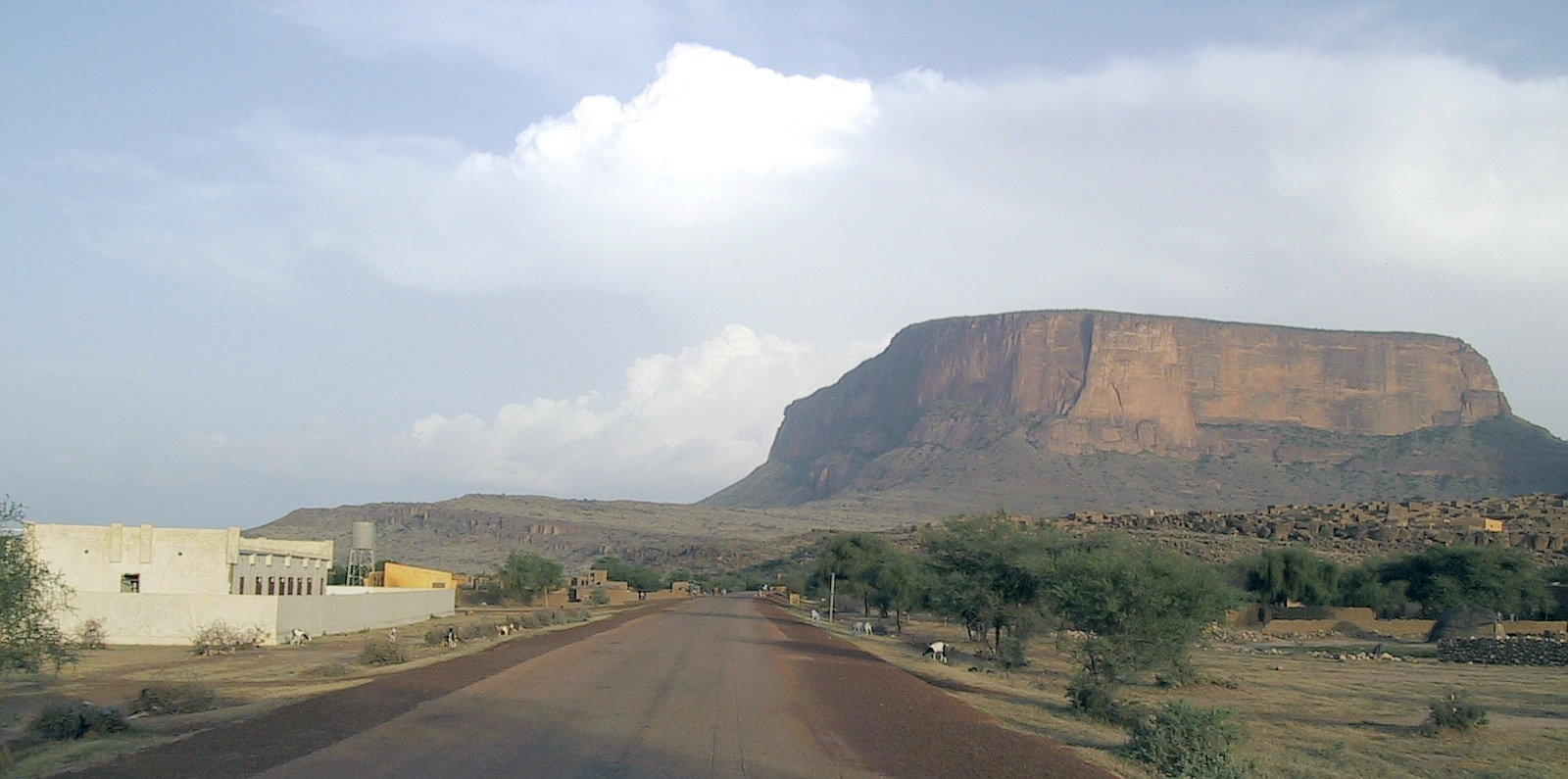 Hombori Tondo, der höchste Berg Malis